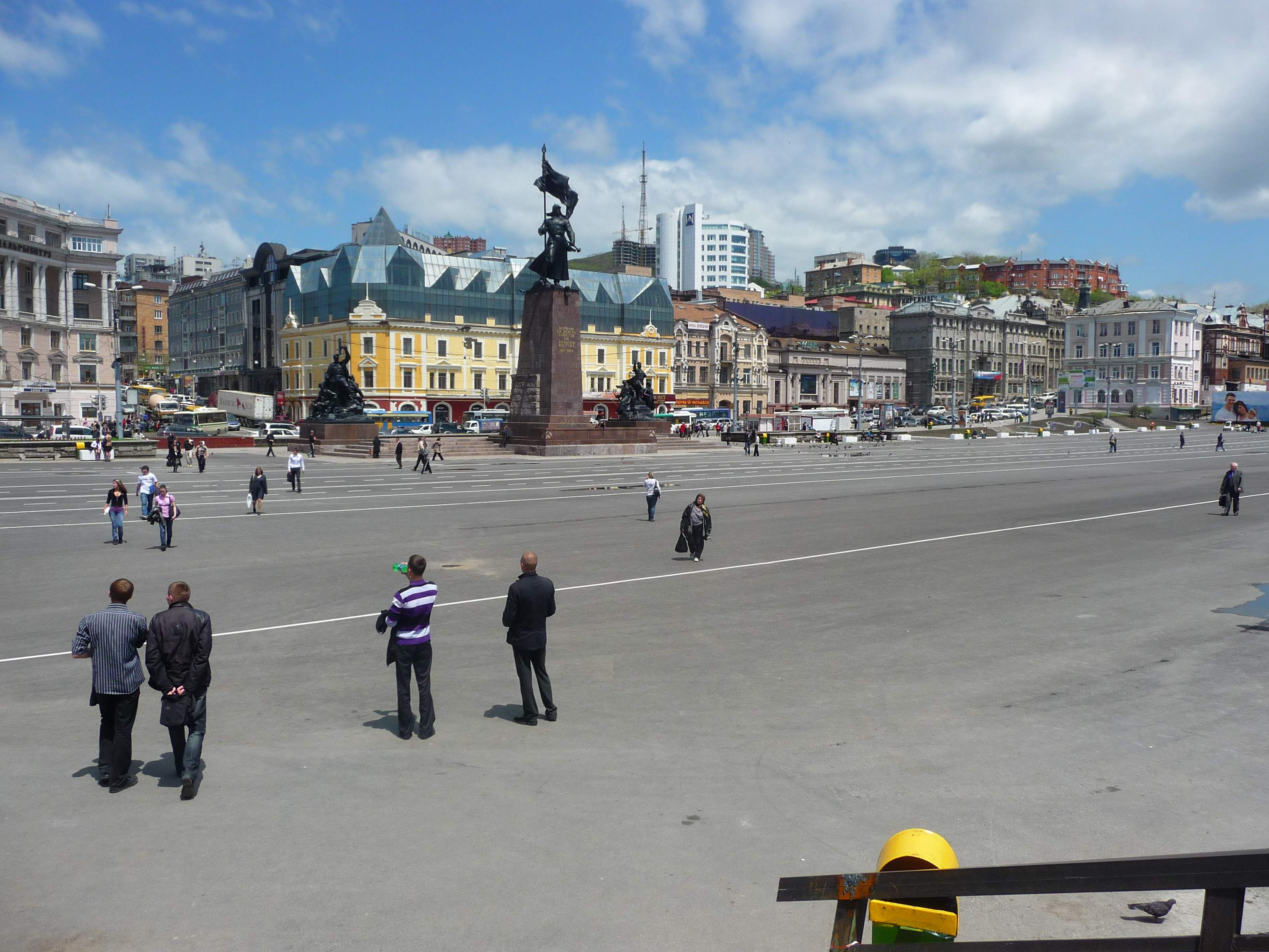 Владивосток, площадь Борцов за власть Советов, 2010-05-26